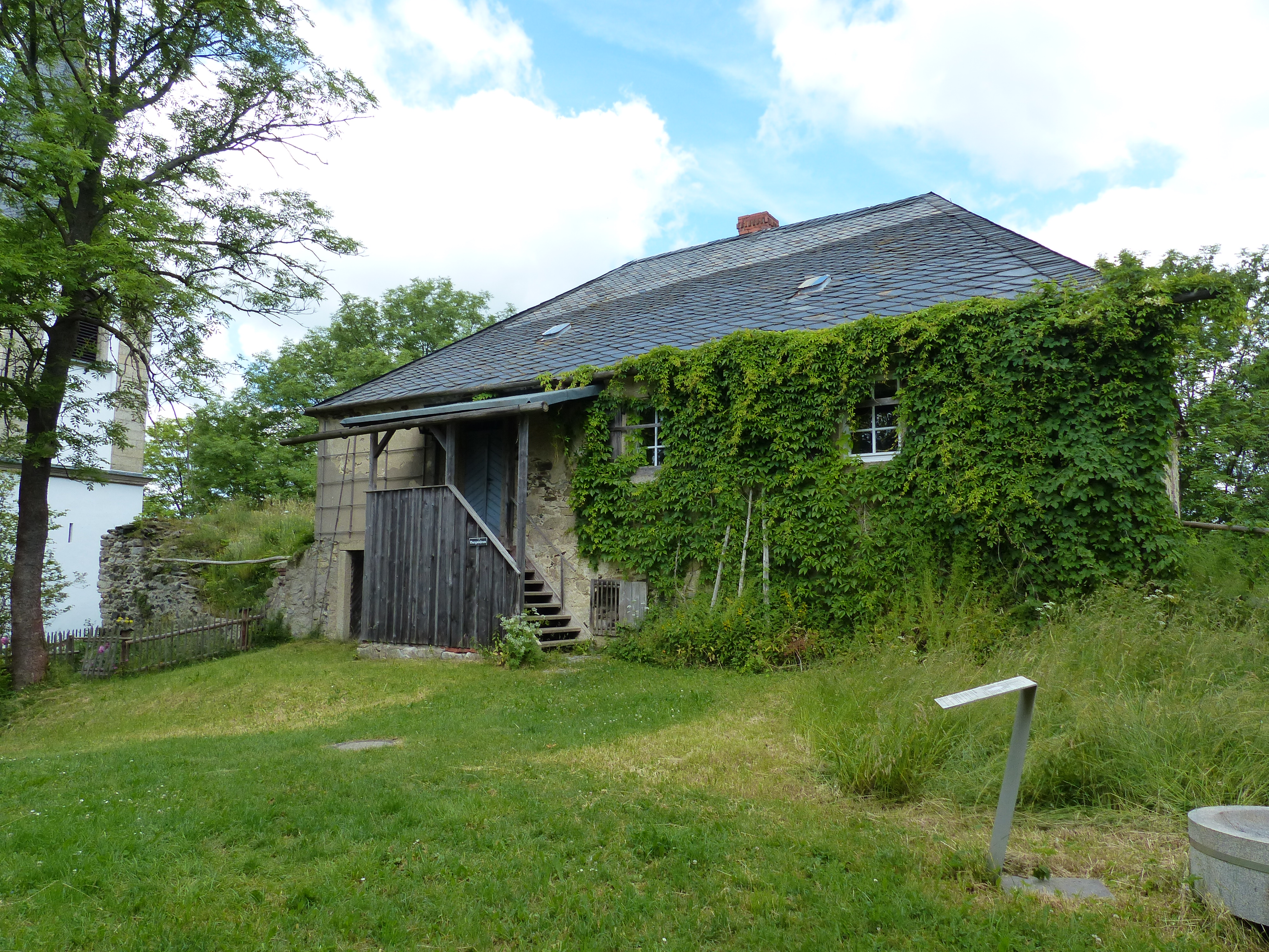 Hallerstein, Ortsteil von Schwarzenbach an der Saale